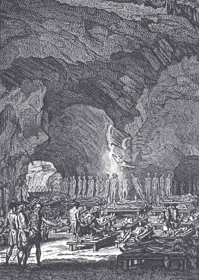 Begräbnishöhle der Guanchen aus „Allgemeine Historie der Reisen zu Wasser und zu Lande oder Sammlung aller Reisebeschreibungen“ Bd. 2 / Teil IV, Leipzig 1748. Nachempfundene Gravur von C. de Putter auf der Basis der Schilderungen eines englischen Arztes